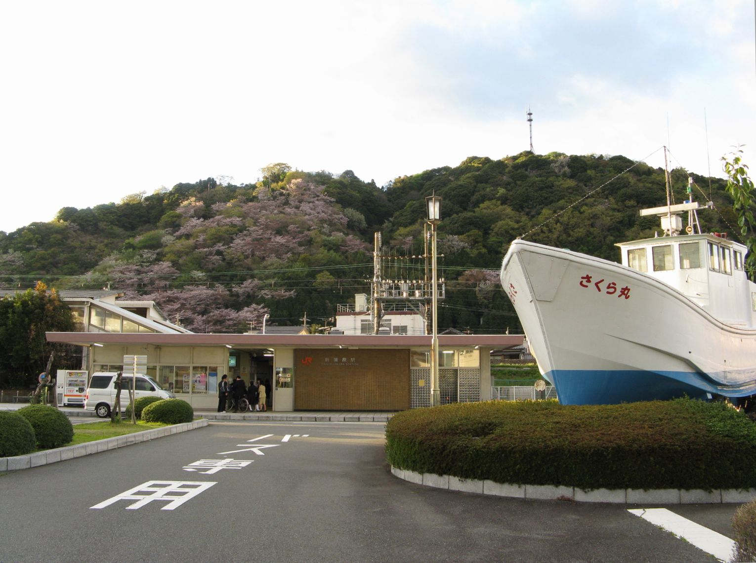 新蒲原駅